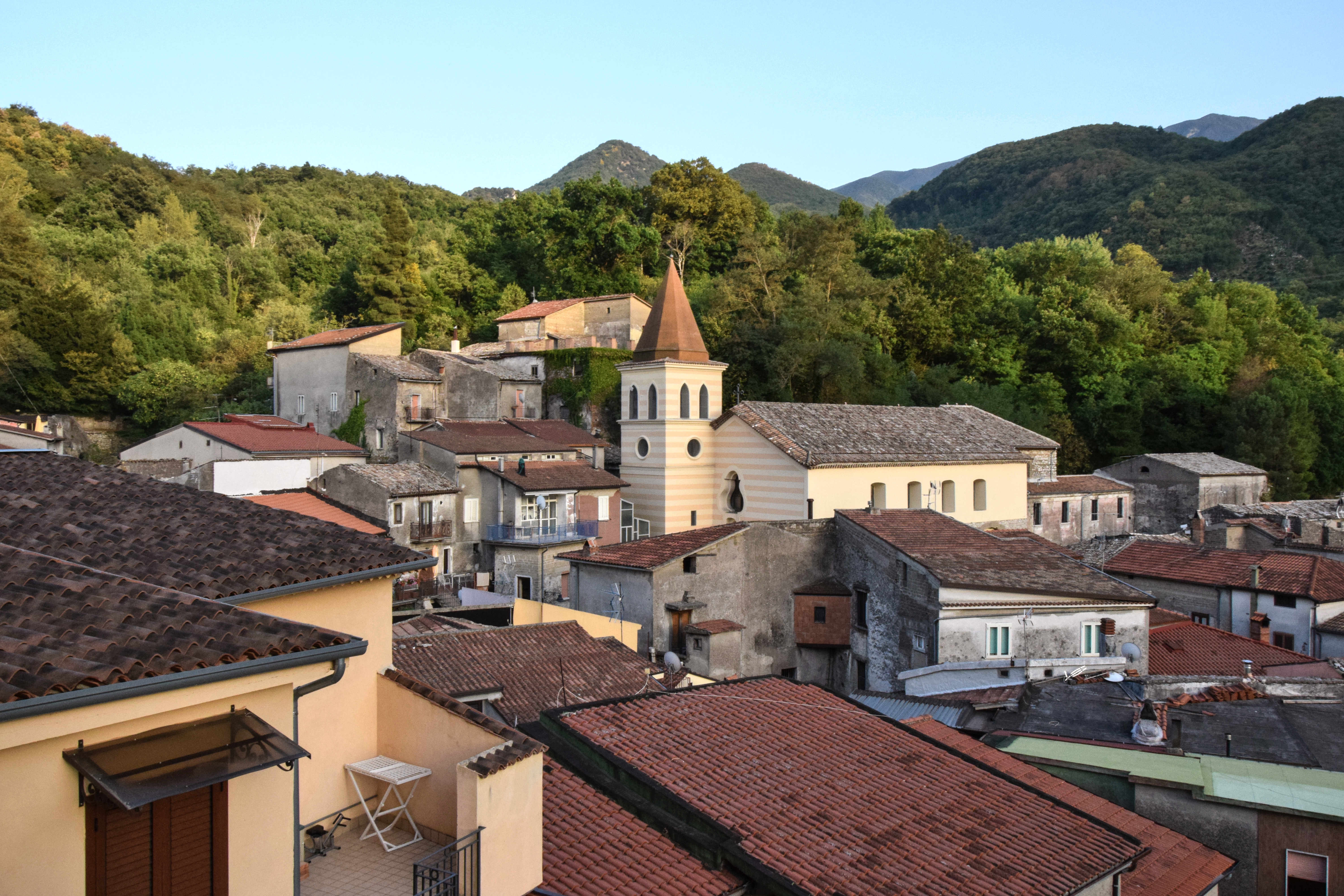 Il centro storico di San Martino Valle Caudina visto dalla terrazza antistante il castello, con la chiesa di San Giovanni Battista